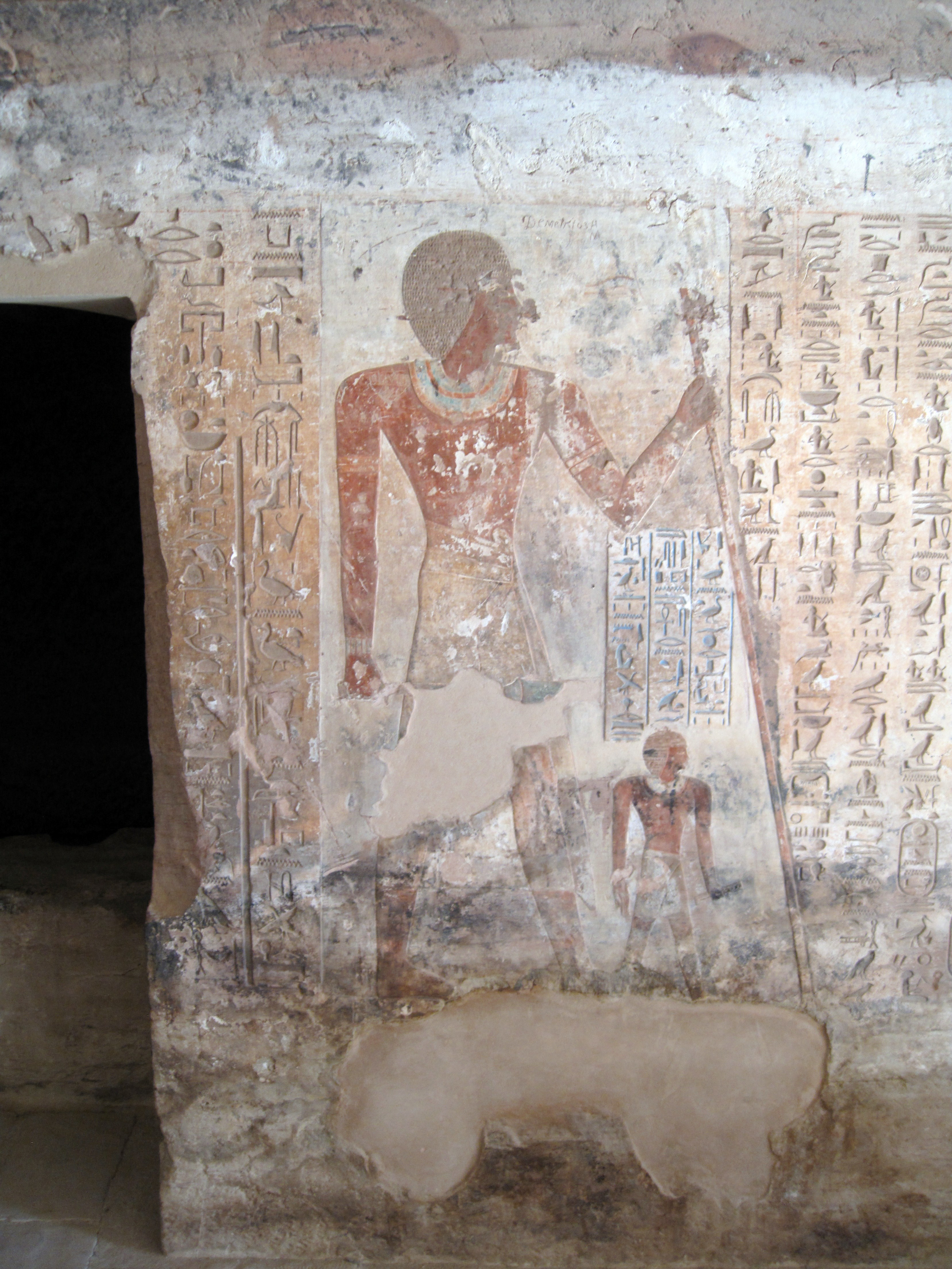 Felsengrab des Ahmose, Sohn von Ibana, unter den Felsengräbern des altägyptischen Necheb bei el-Kab, Ägypten